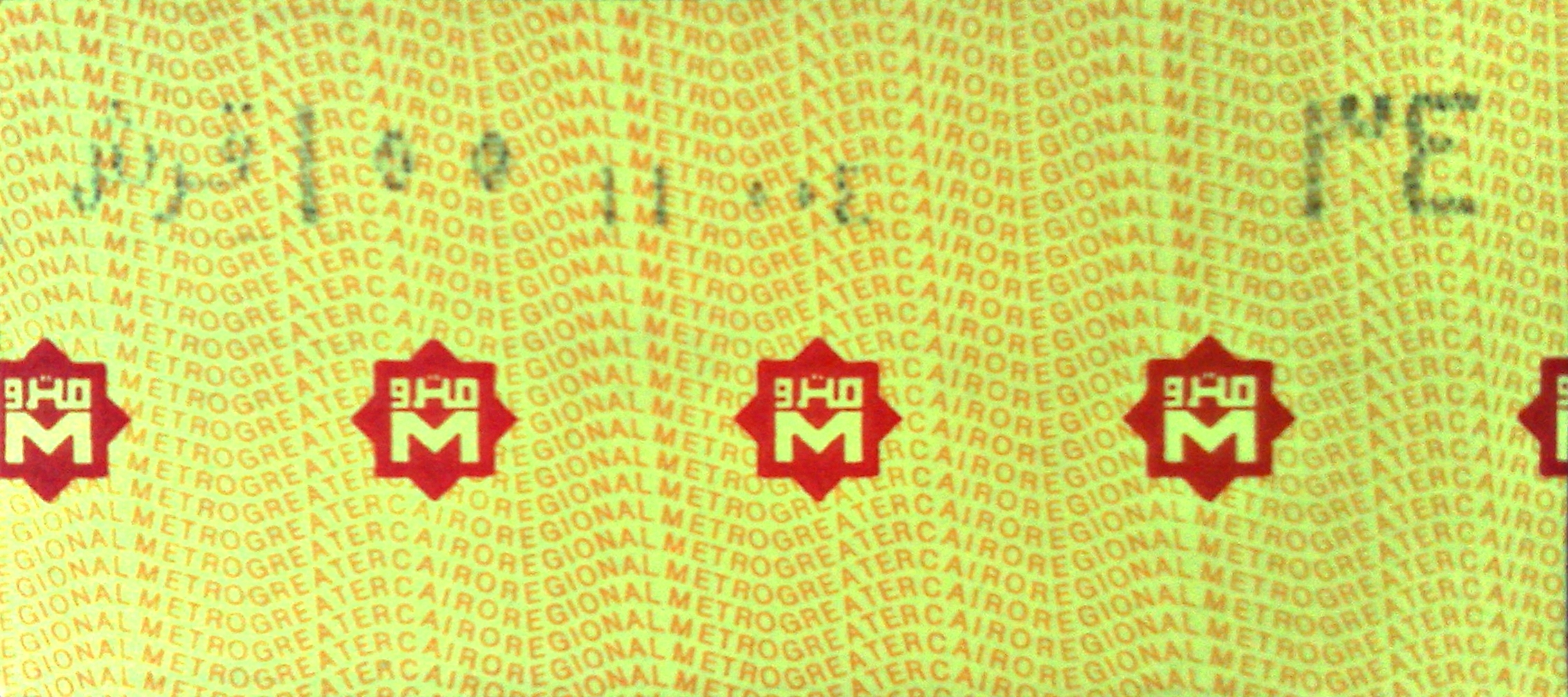 تذكرة قطارات أنفاق القاهرة